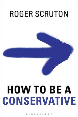 Cover